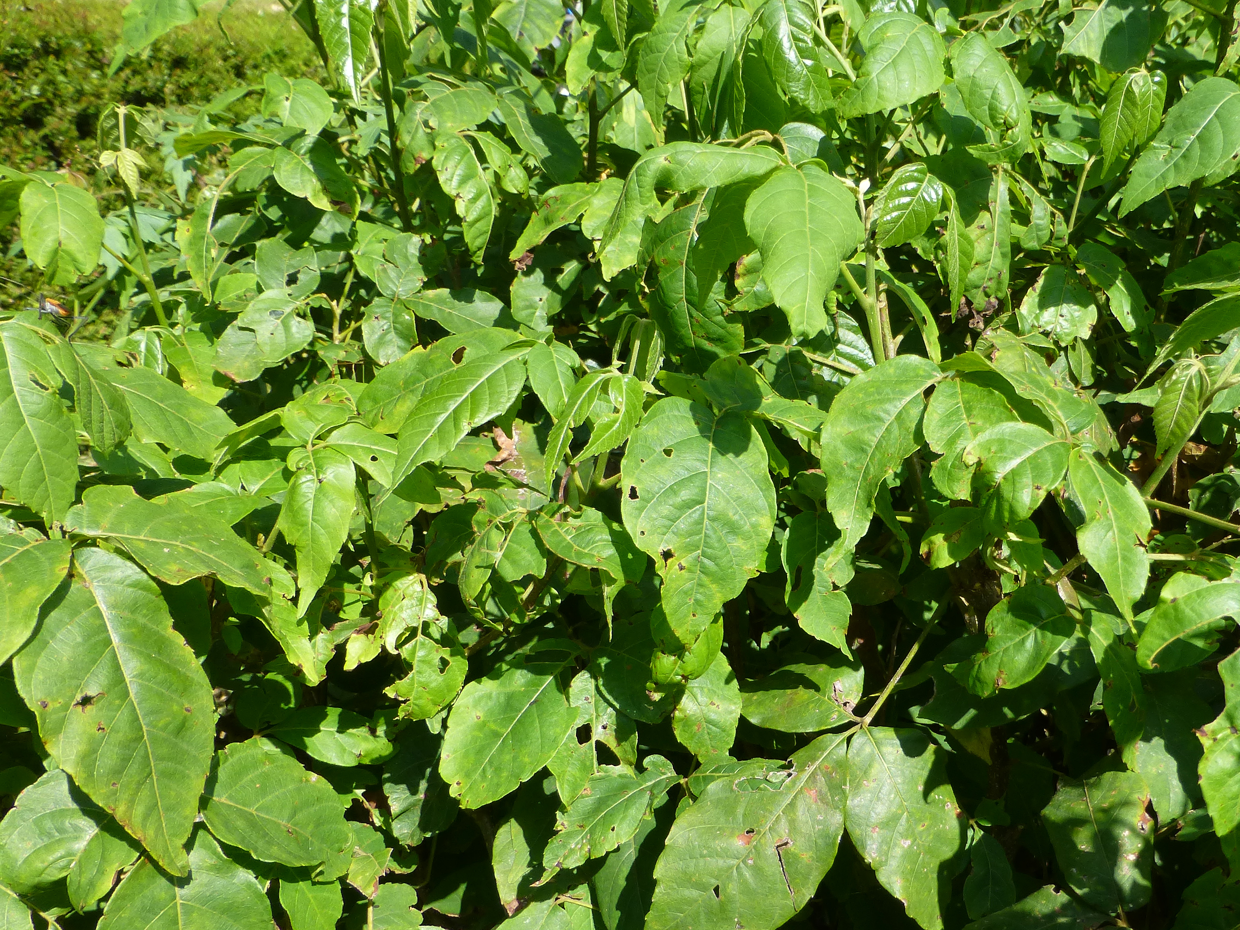 Allophyllus cobbe au Jardin botanique de Kandy (Sri Lanka). Origine : Sri Lanka, Inde, nord de l'Australie.